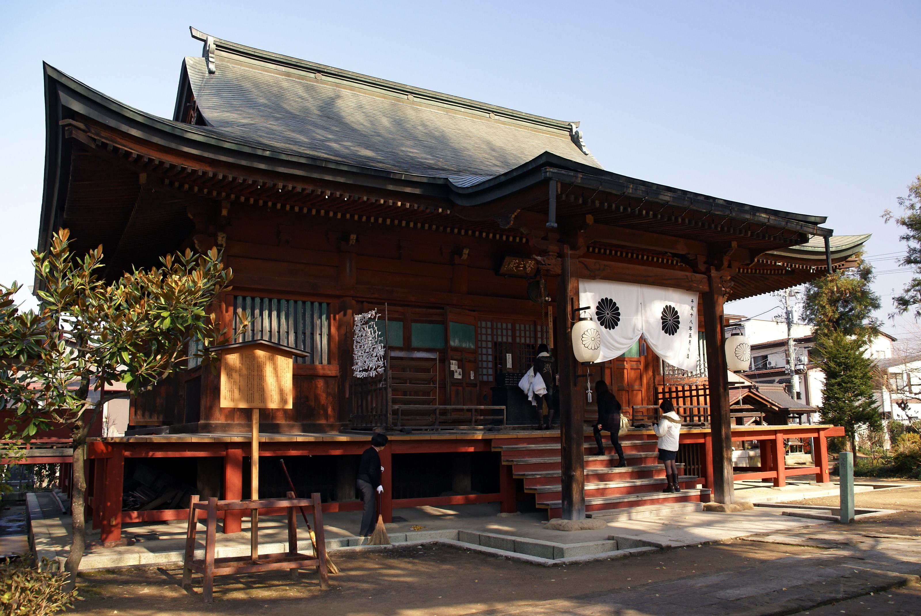 Hida-kokubunji in Takayama, Gifu prefecture, Japan